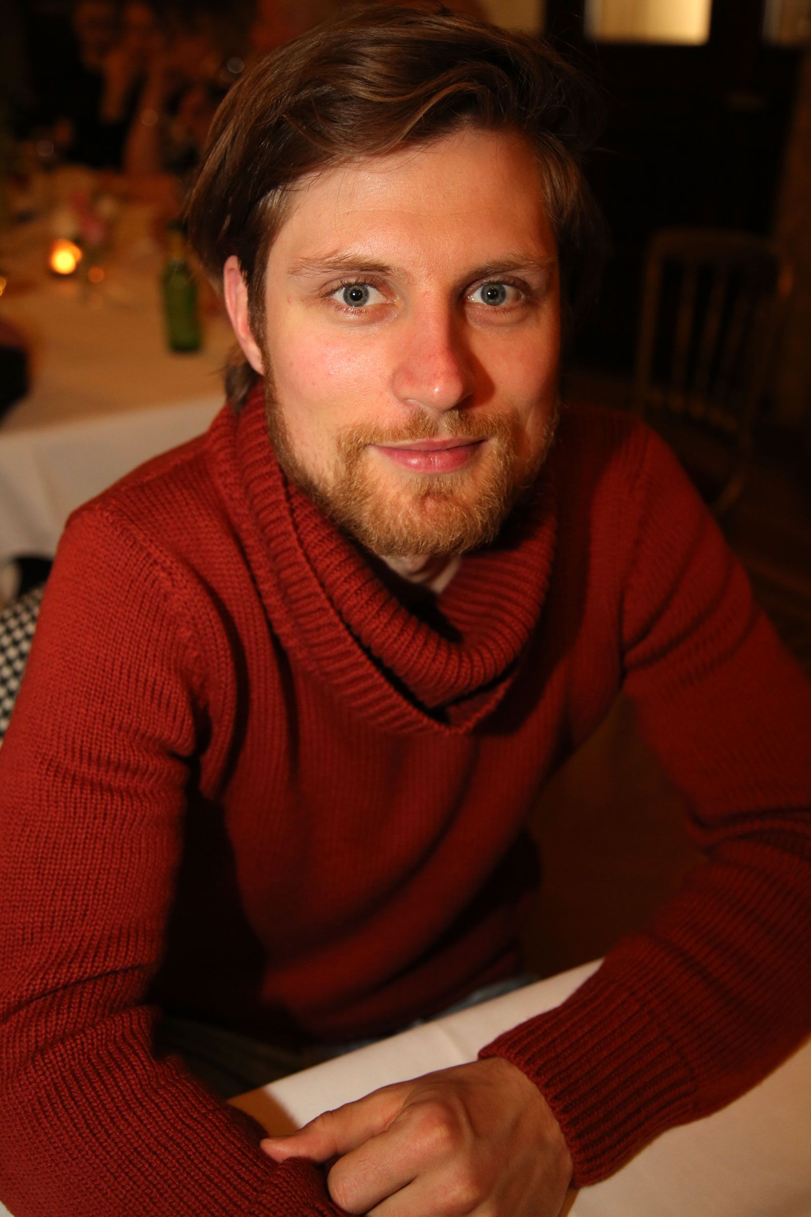 Jähnert_Andreas-9450